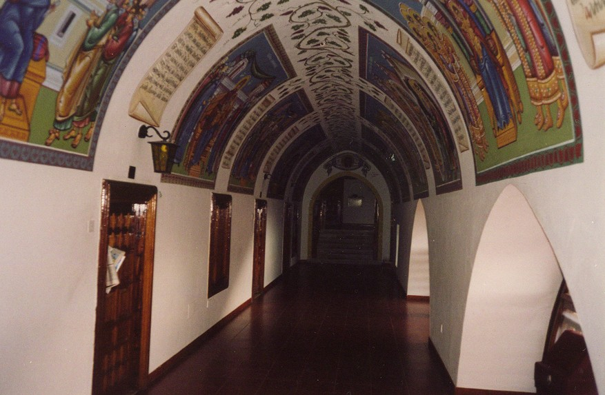 Monasterio de Kikkos. Galería interior. Troodos. Chipre. Imagen tomada por el cargador. Año 1998.